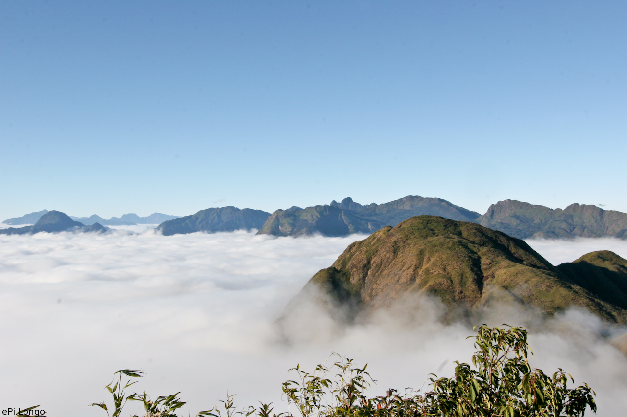 Hoàng Liên Sơn mountain range.